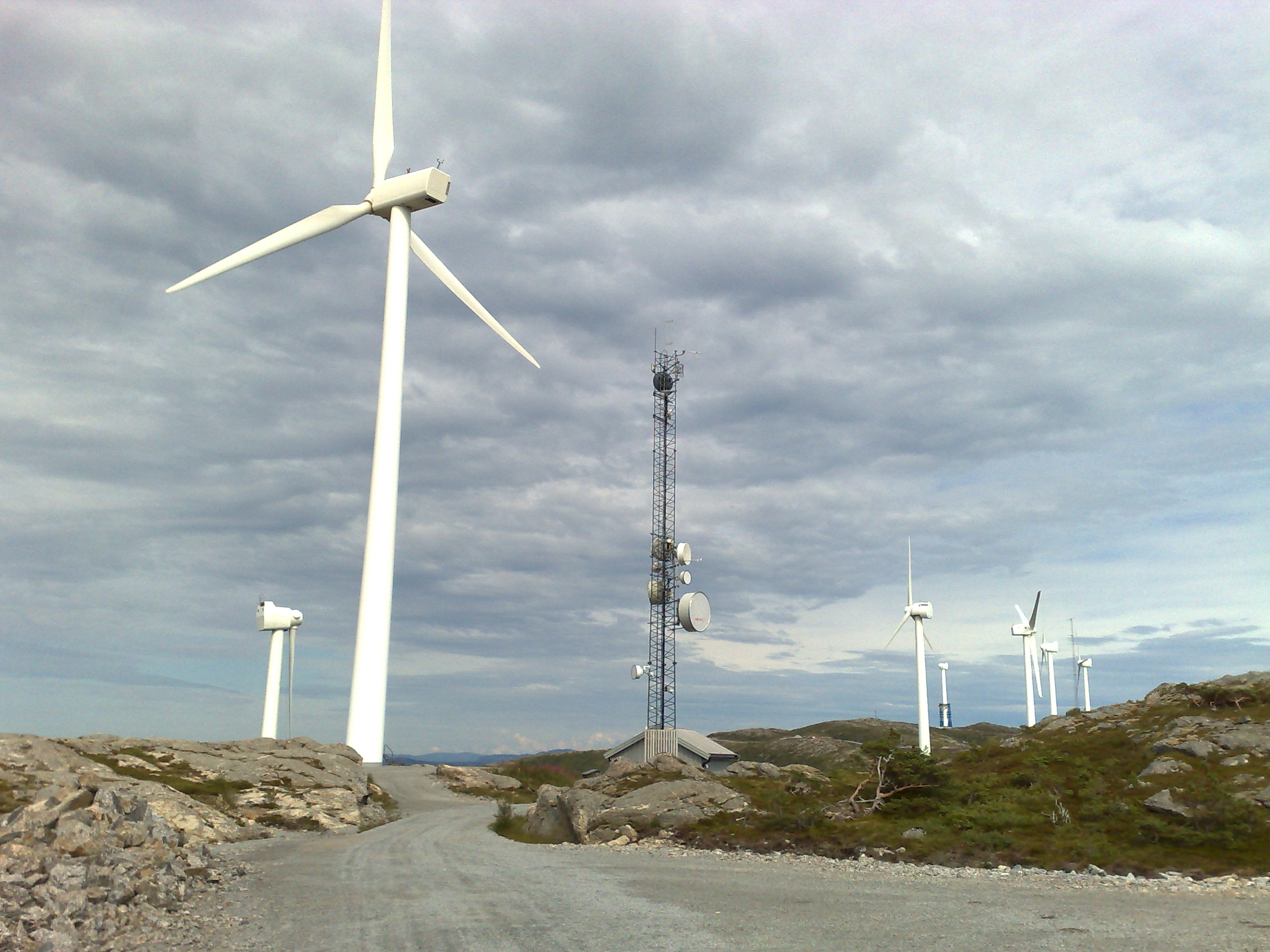 Windmills at Hundhammarfjellet in Nærøy, Norway